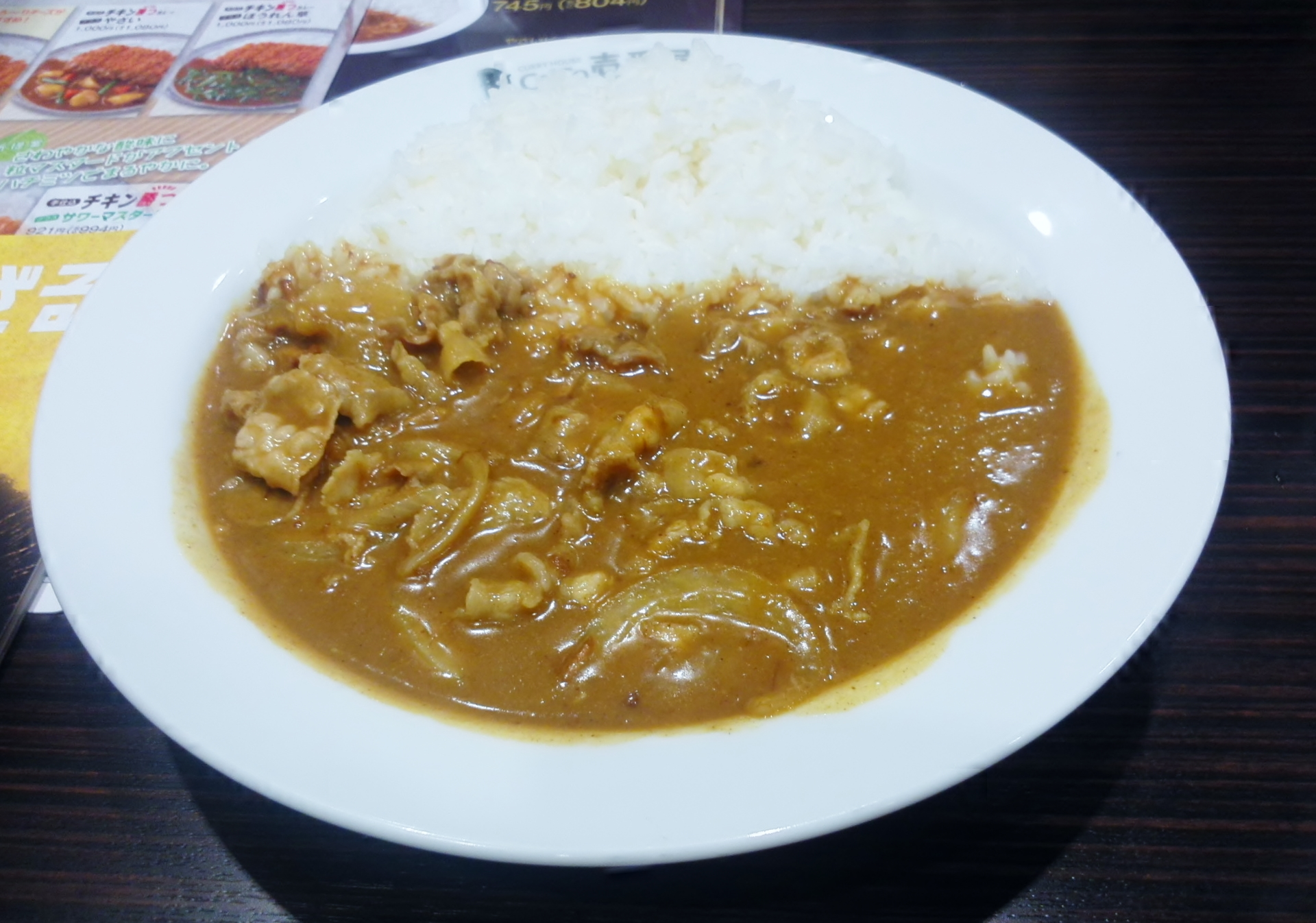 CoCo壱番屋の豚しゃぶカレーを撮影。